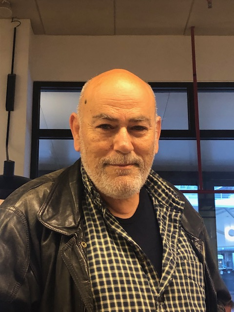 Daniel Wachsmann